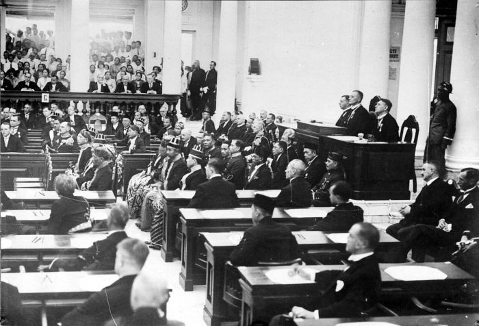 Repronegatief. Opening van de Volksraad, Java.